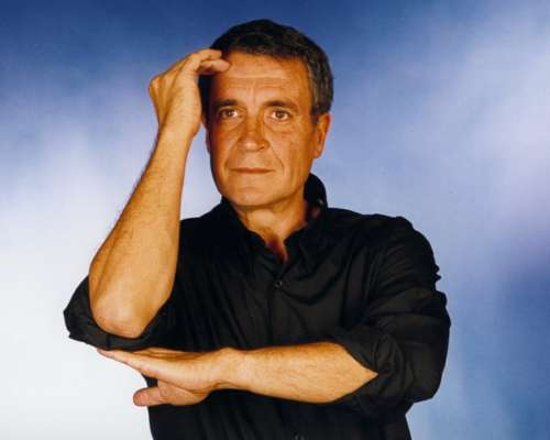 El actor español Pepe Rubianes.